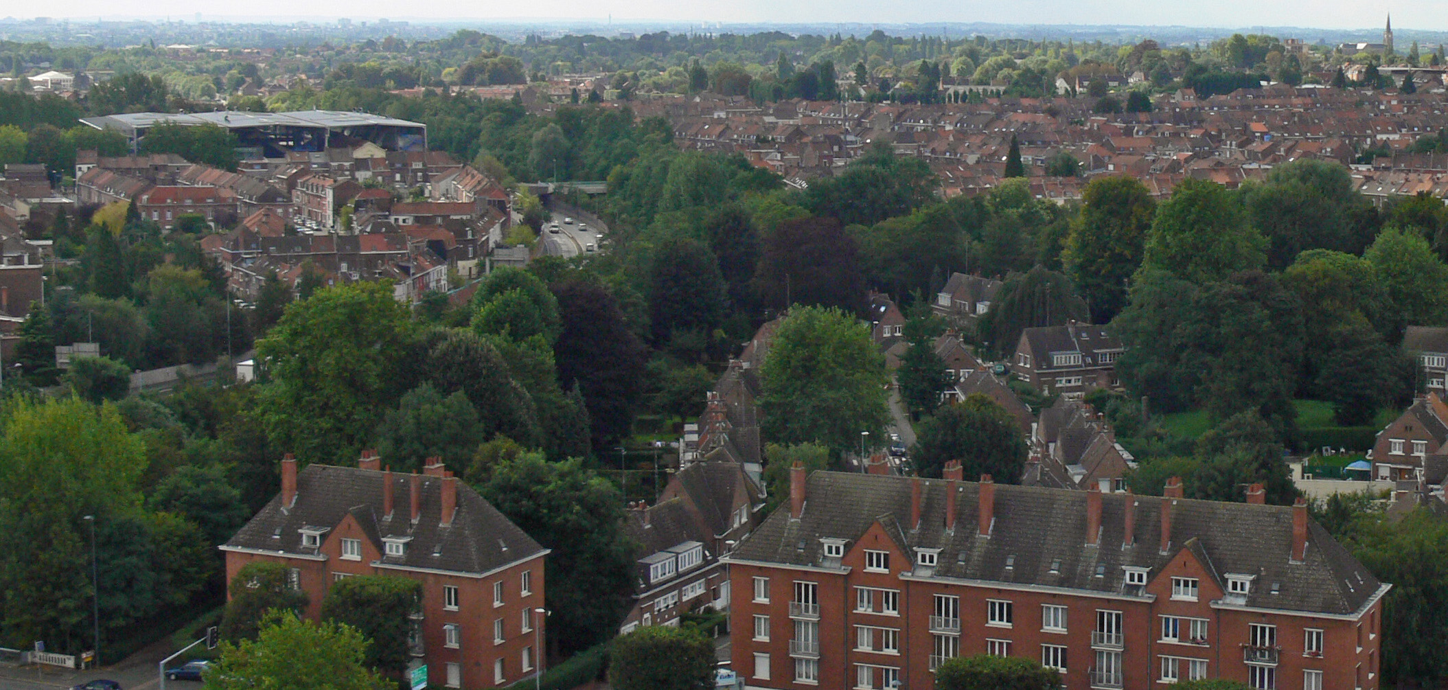 Vue de la périphérie de la Zone de l'Union, avec la voie rapide urbaine (VRU) vers Lille, qui longue le canal bordé d'arbres (date de la photo : 2010-09-17)